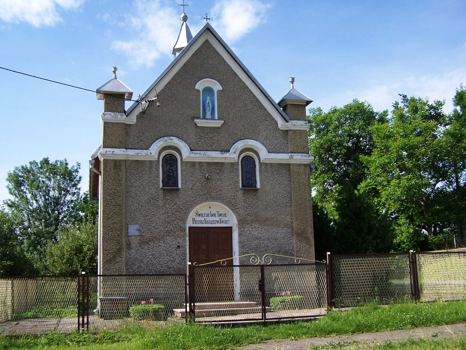 Kaplica na Górze św. Jana (miejscowość Zegartowice)